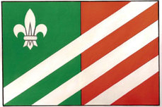 vlajka obce Zámrsky